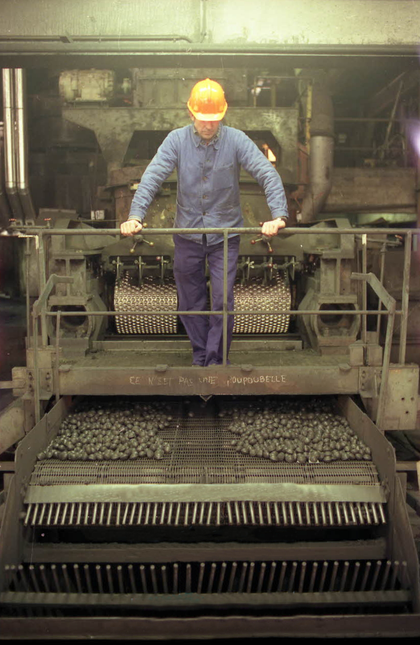 Presse à Boulets